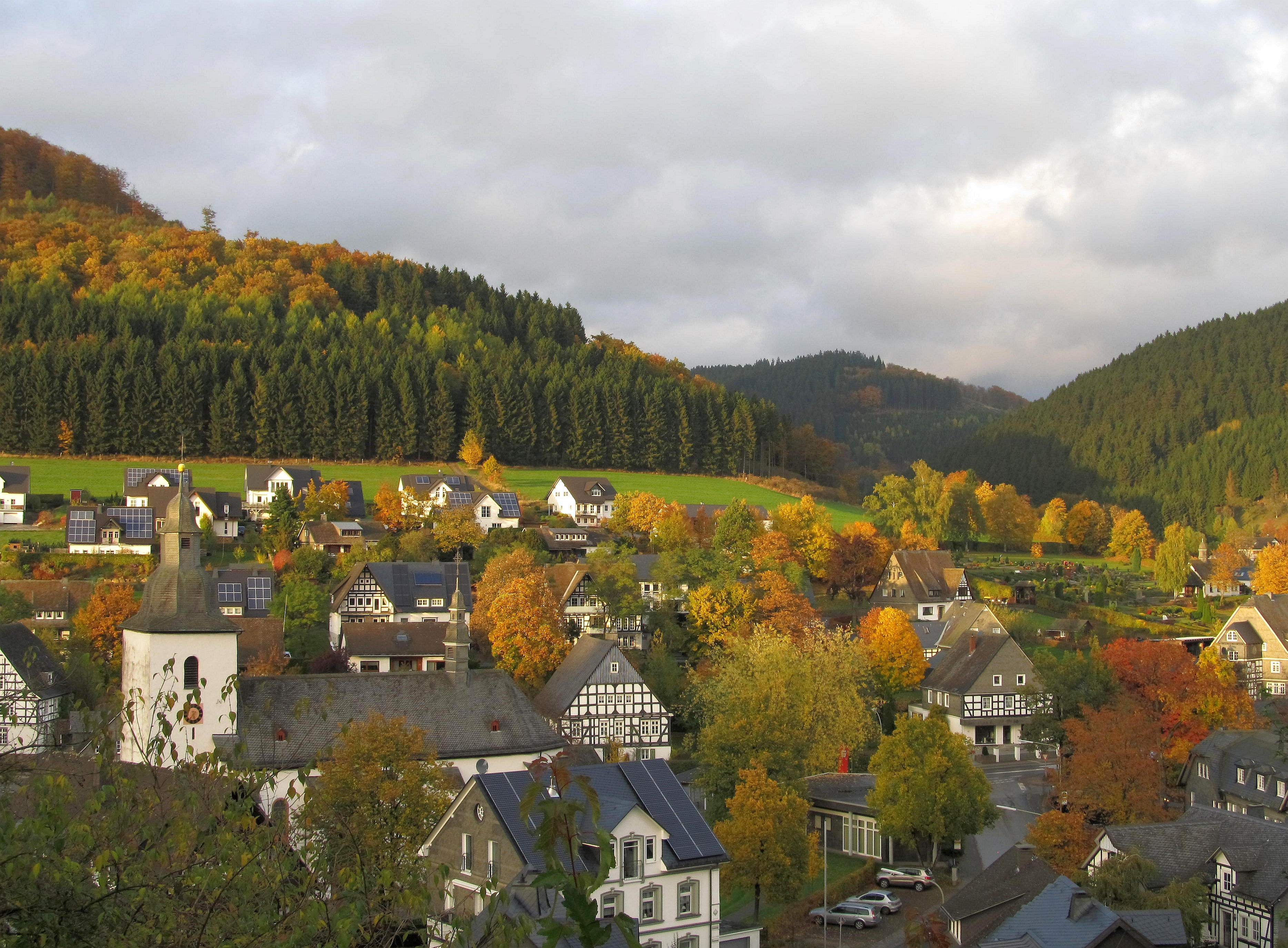 Schmallenberg-Oberkirchen (Germany)